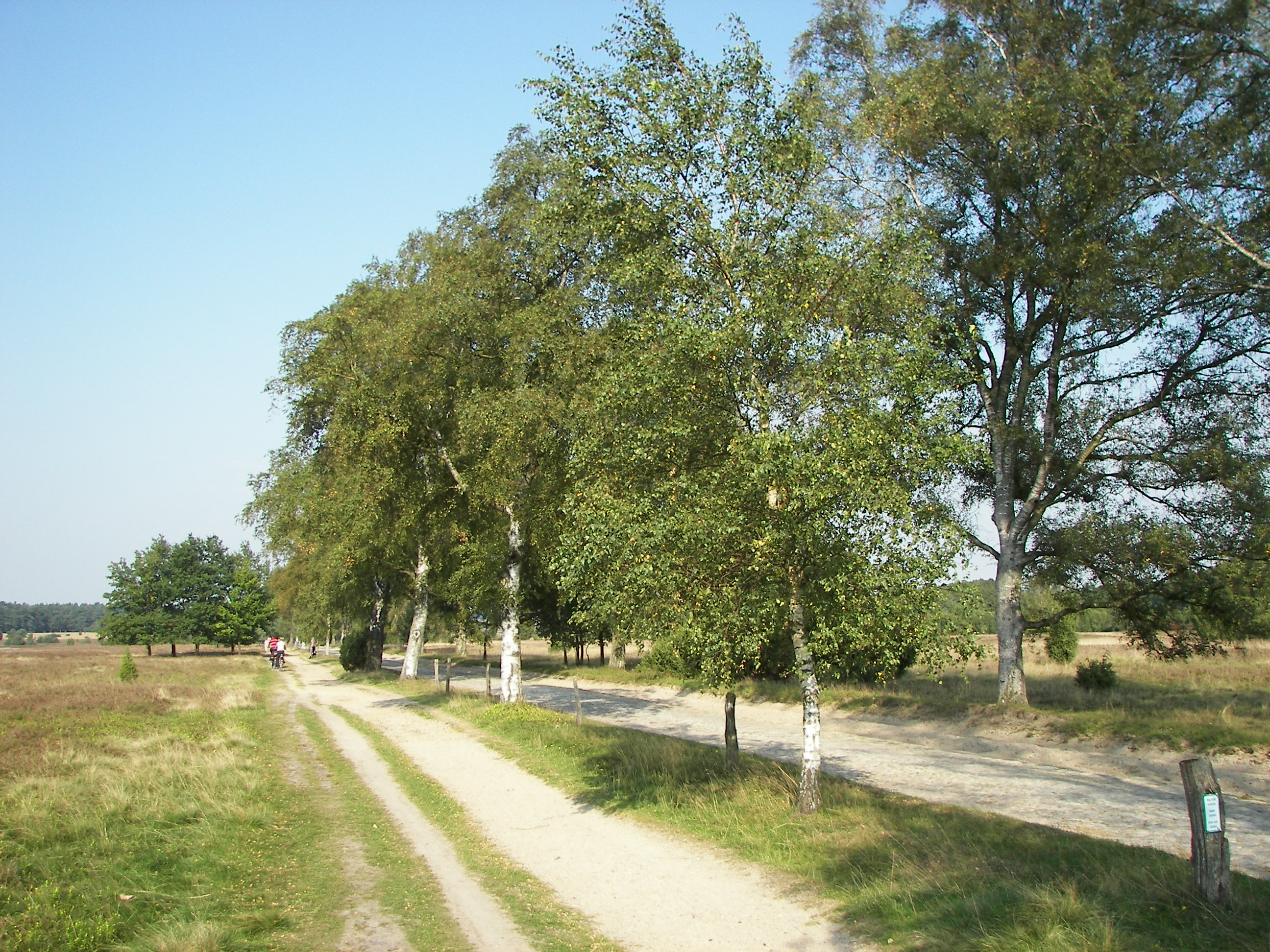 typischer Heideweg zwischen Wilsede und Undeloh